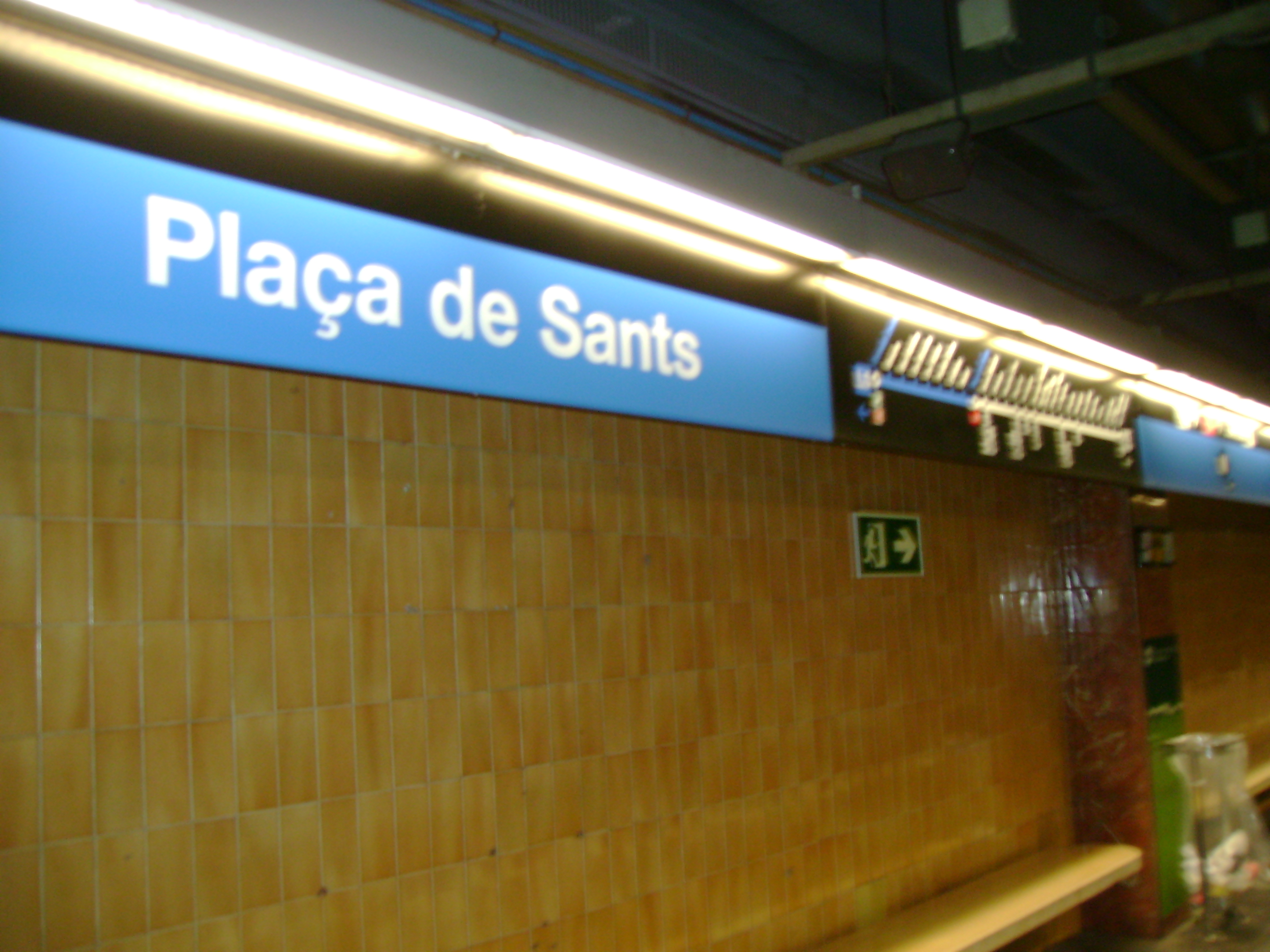 Foto capturada per la meva càmara a l'estació de Plaça de Sants (Metro de Barcelona).